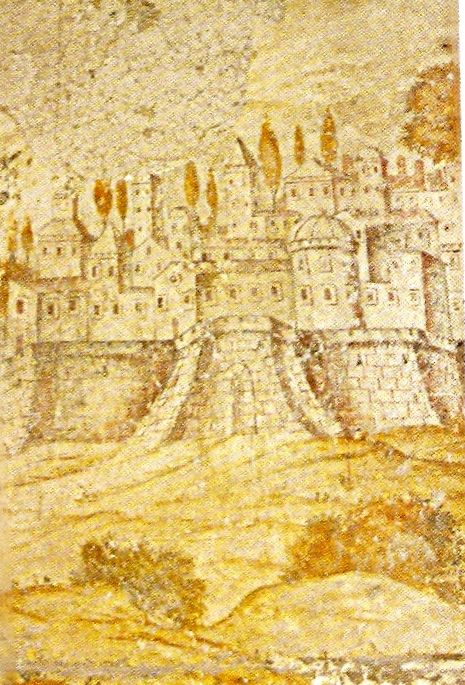 Dipinto murale nella chiesa di S. Vincenzo Ferreri